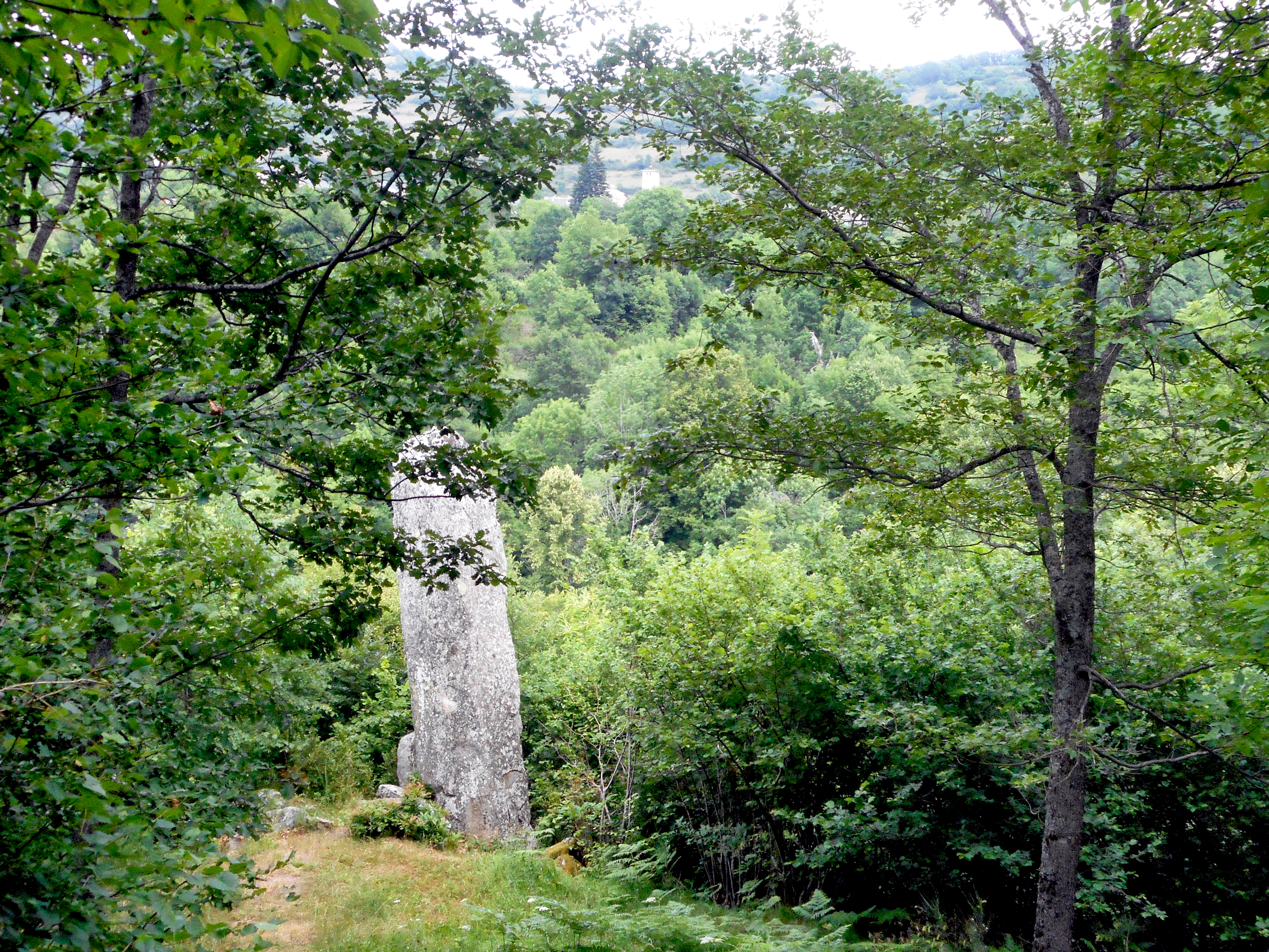 Counozouls, Aude (Occitanie) - Menhir dit le Grand Menhir de Counozouls, plus grand menhir du sud de la France.haut de 8,90 m et d'un poids d'environ 50 tonnes..